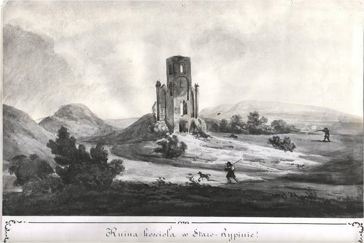 Pocztówka z 1908 r. Kościół św. Piotra i Pawła (Bożogrobców) w Starorypinie z XIV w.